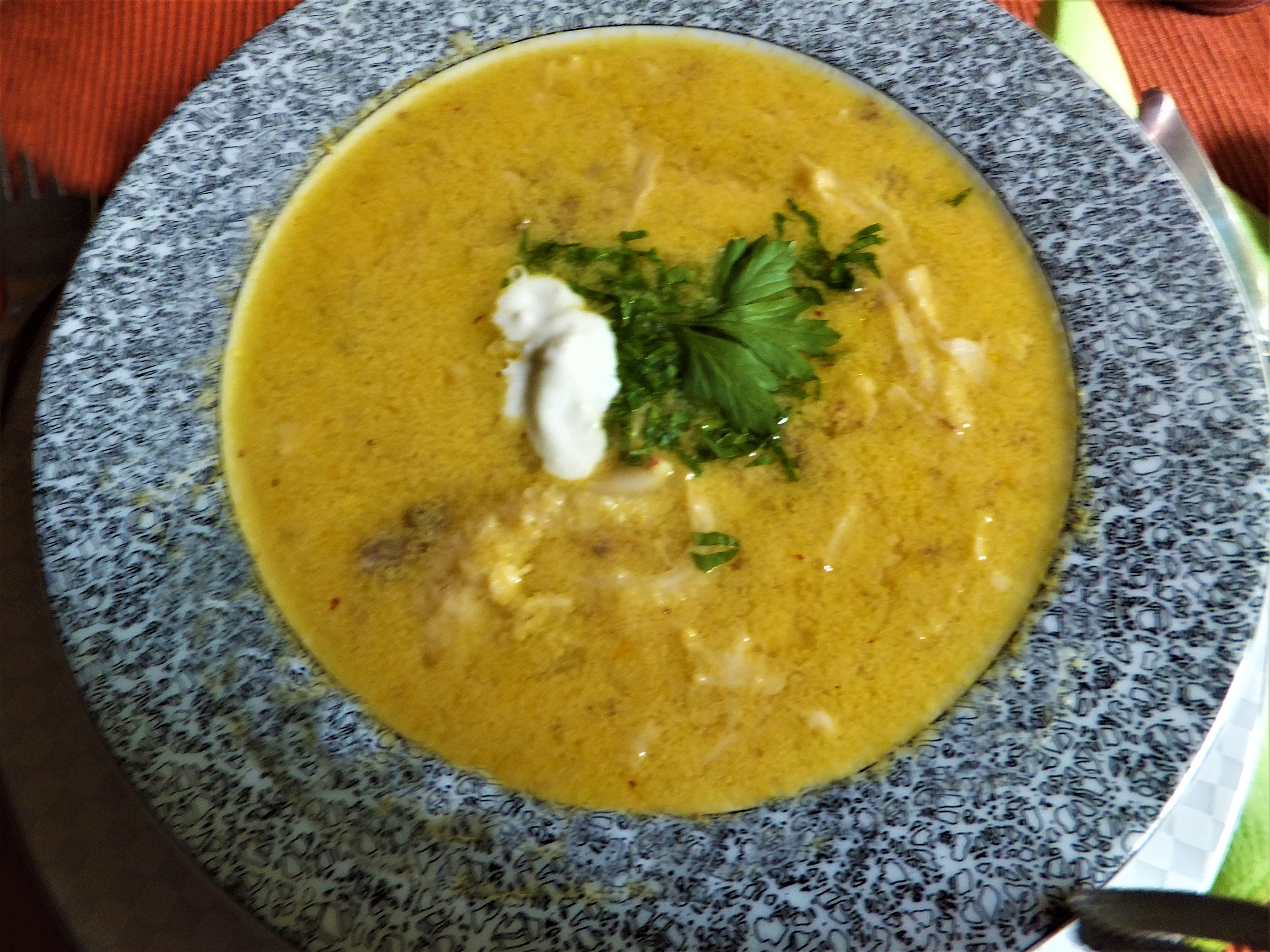 Ciorba de burta